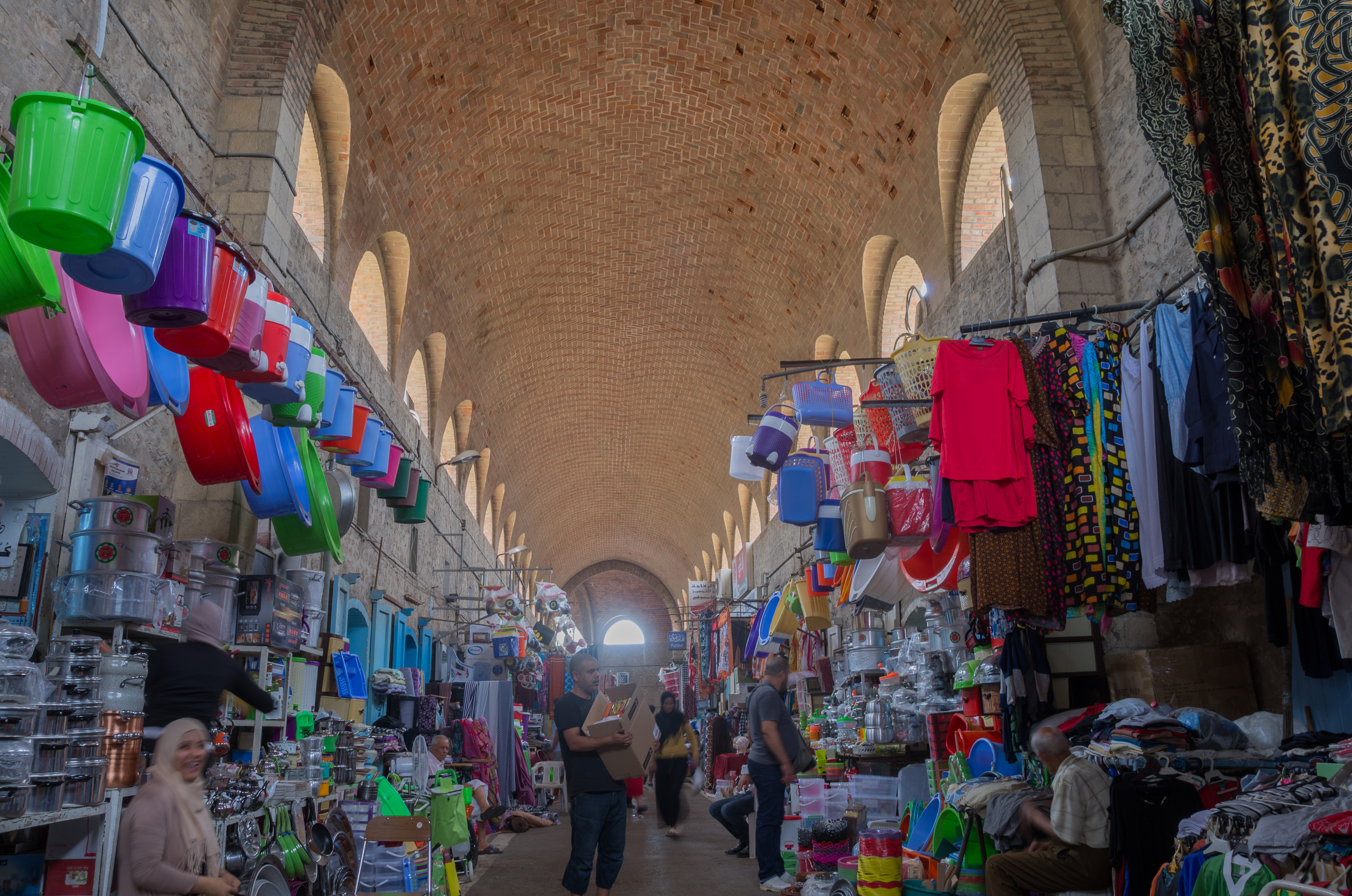 Souk Kriaâ